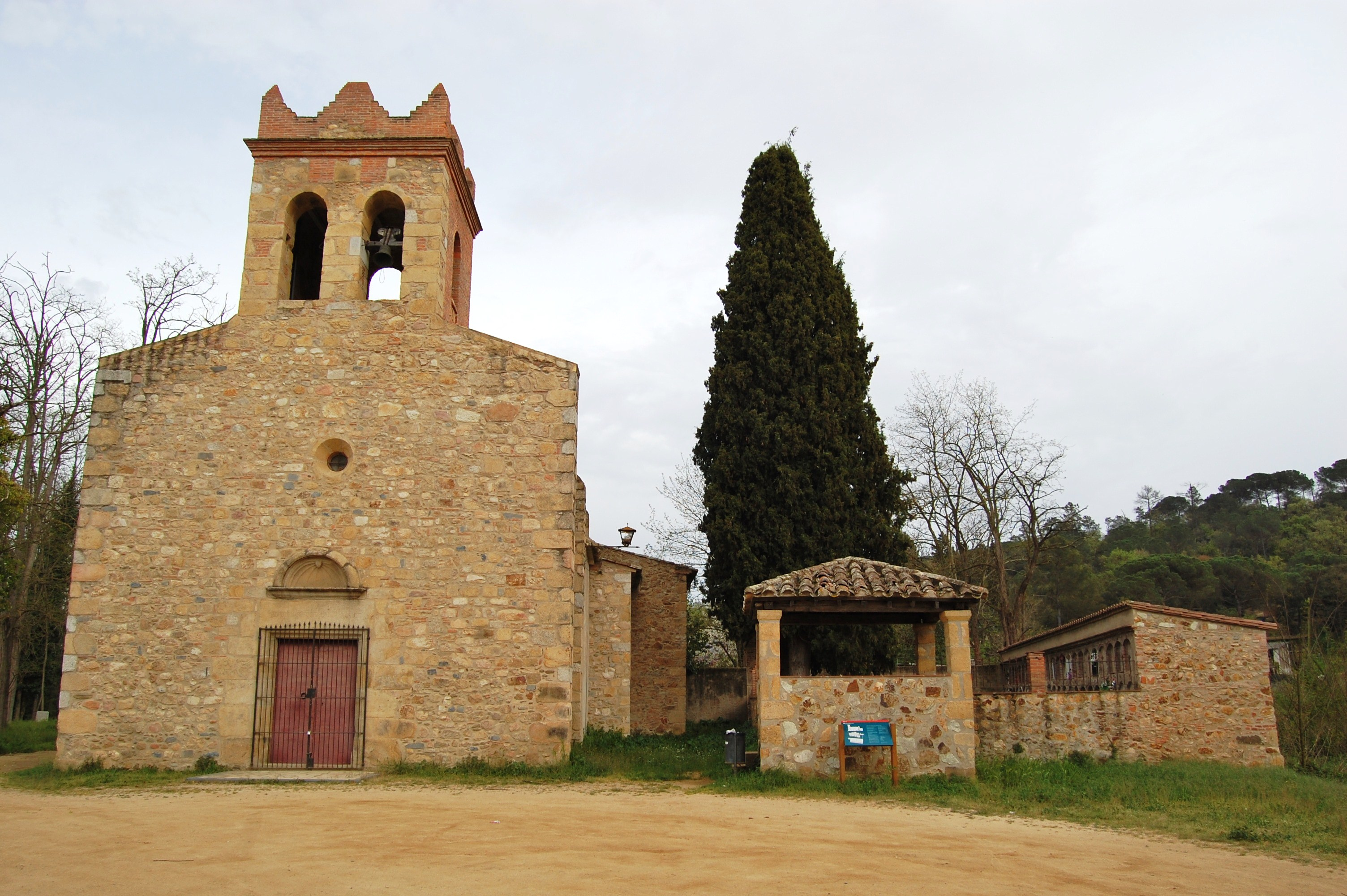 Església de Sant Cebrià de Fogars de la Selva amb comunidor i cementiri.